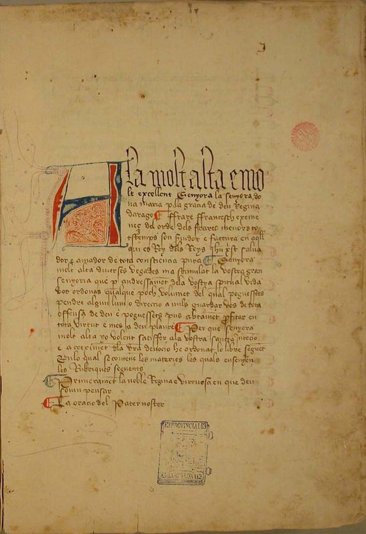 Inici del manuscrit de la Scala Dei de Francesc Eiximenis al manuscrit 88 del Fons de Reserva de la Biblioteca de la Universitat de Barcelona.